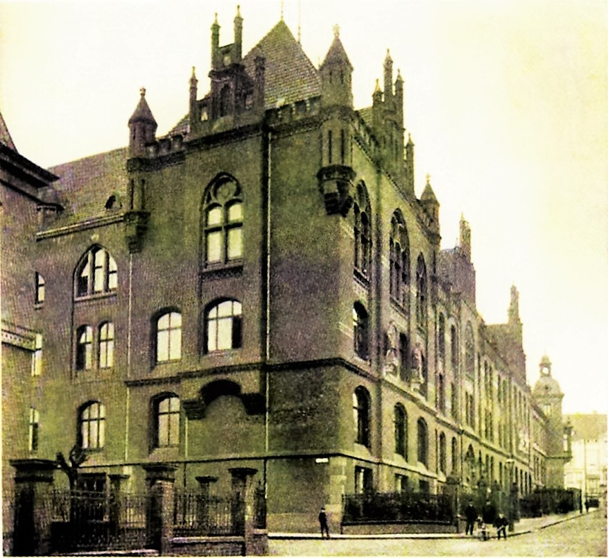 RWKS Syndikatsgebäude